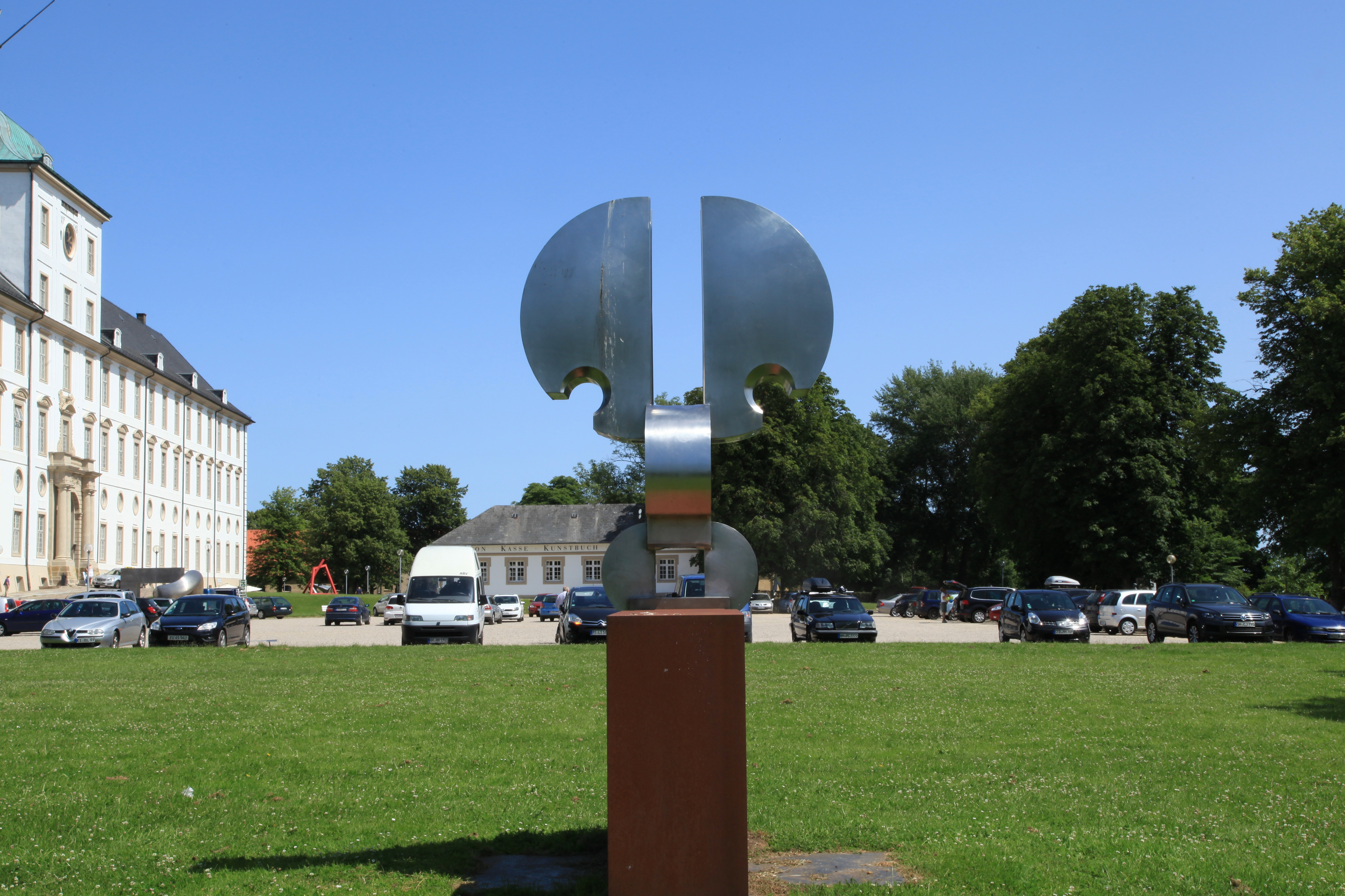 Großer Mauerreiter von Jörn Pfab, 1979/1980, im Skulpturenpark Schloss Gottorf auf der Schlossinsel in Schleswig